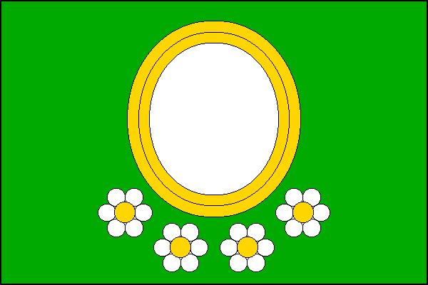 Vlajka obce Hošťálkovy